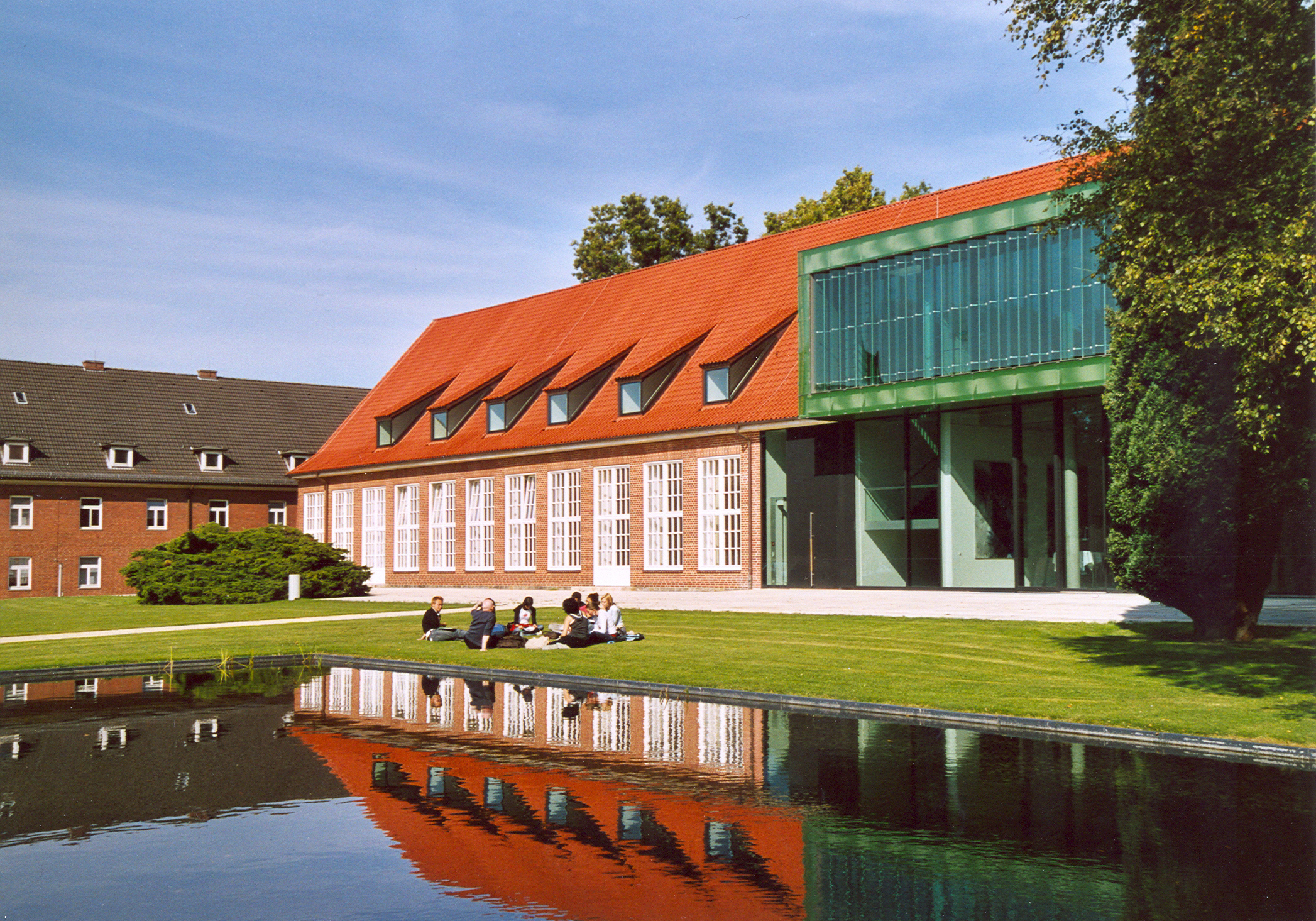 Campus der IUB